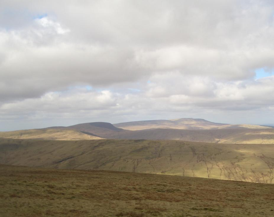 fan nedd